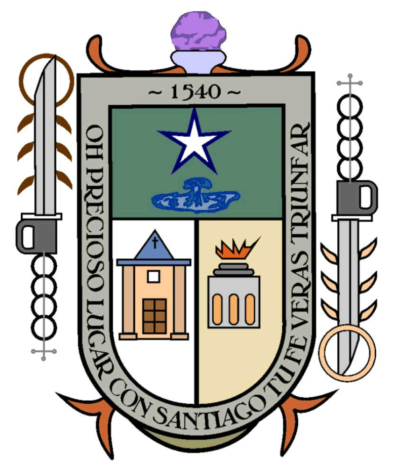 ESCUDO DE ARMAS: La descripción del escudo del Municipio de Santiago Maravatío, Gto, es como sigue: 1.En la parte superior tiene un florero con un ramo de lirios acuáticos que representan a la mujer cristiana. 2.Abajo del florero está inscrita la fecha 1540 que significa el año en que fue fundado el pueblo, por Cédula Real, firmada por Carlos V, el 29 de enero de 1540 en Cuenca, España. 3.Una fachada sencilla de un templo misional que representa la fe (fondo blanco). 4.Un campo verde (Maravatío) con un pequeño estanque (manantial) y una estrella plateada en alto (María) todo significa esperanza. 5.Un anillo en rotonda con un pebetero en llamas (la caridad). 6.La espada apuntando hacia arriba indica la lucha. 7.La espada apuntando hacia abajo indica la victoria. 8.En su rededor, un letrero que dice “HO PRECIOSO LUGAR CON SANTIAGO TU FE VERAS TRIUNFAR”.